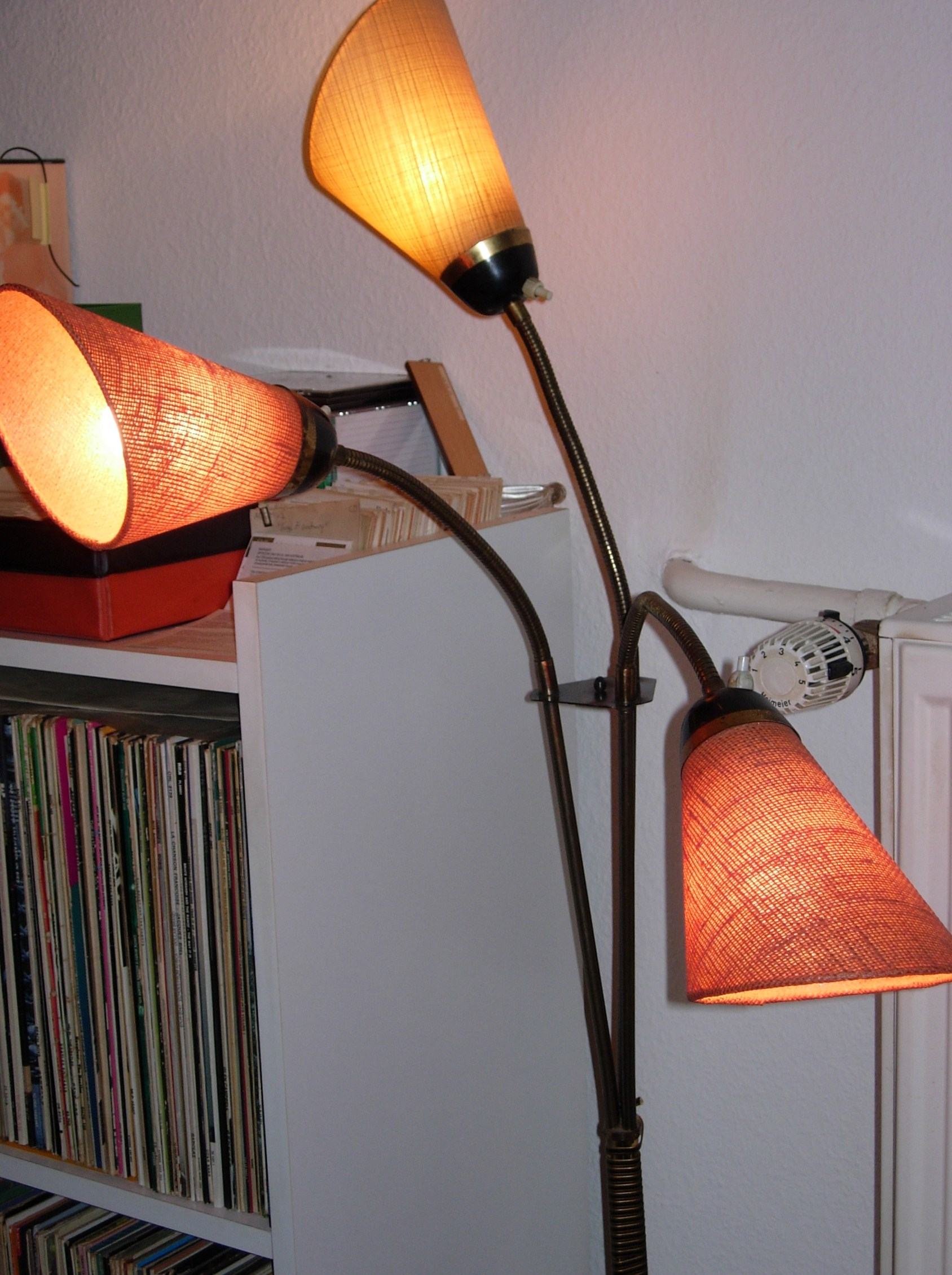 Wahrerwattwurms Tütenlampe aus den 1950er Jahren